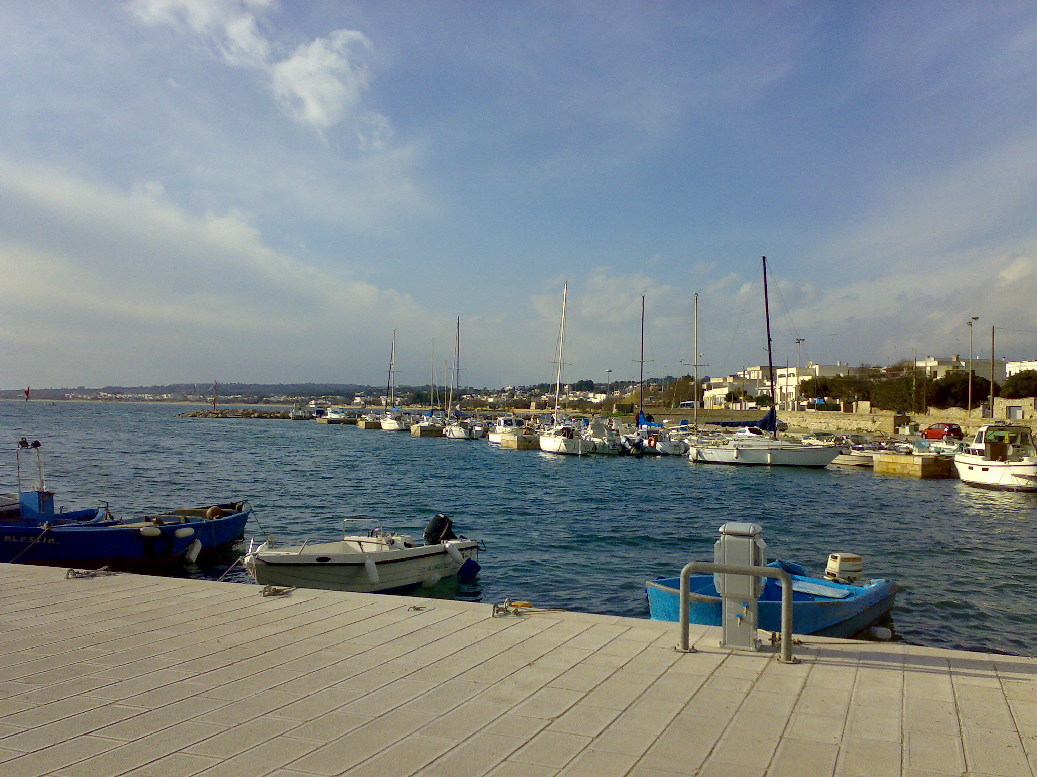 Porto Torre Vado